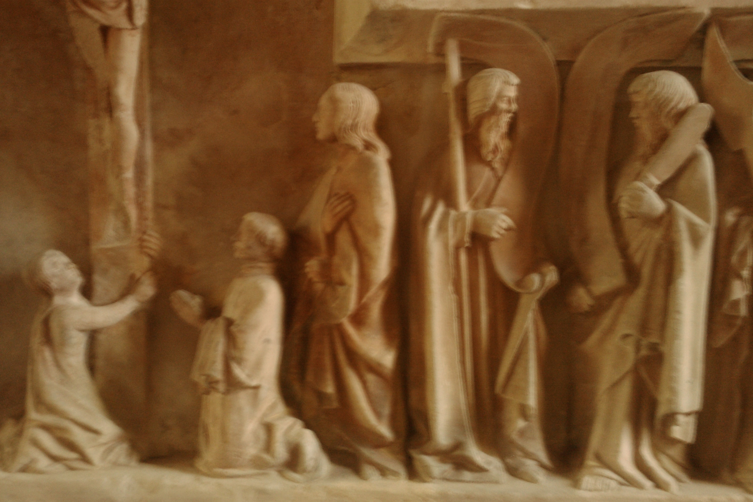 Retable de la Crucifixion, XVe